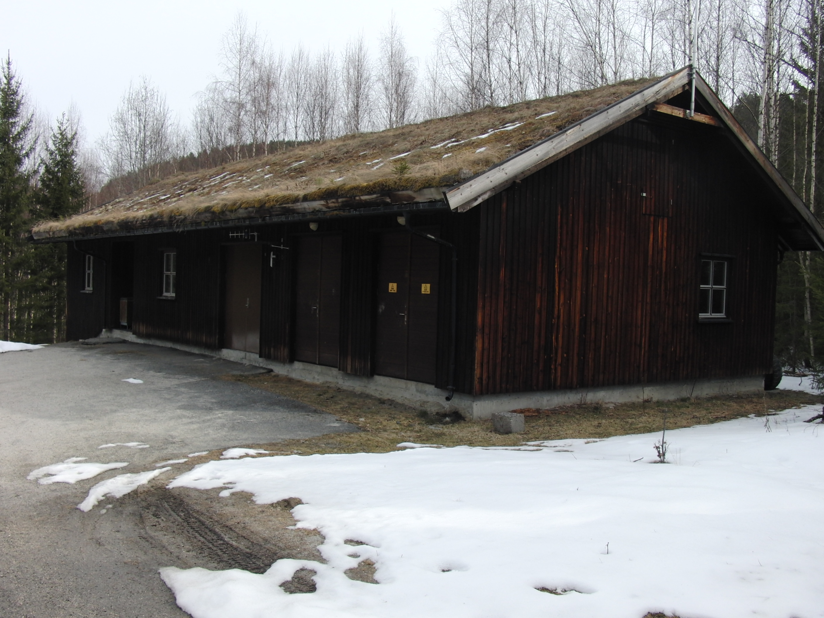 Sønsteby kraftverk